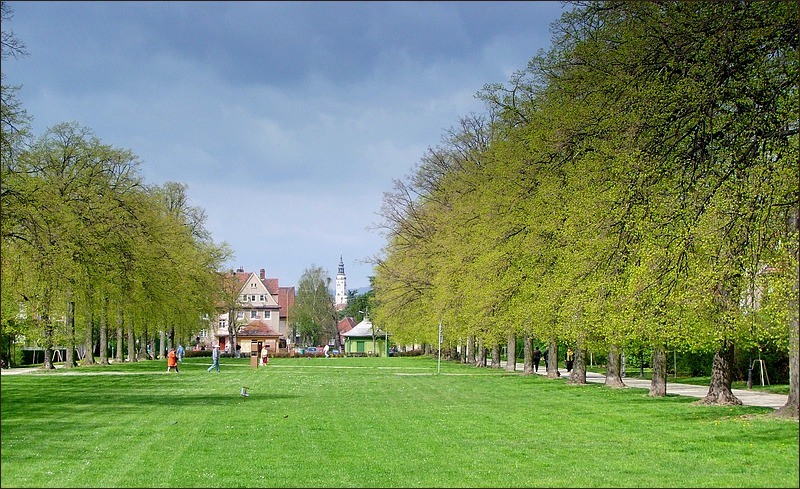 Zgorzelec, zespół parków miejskich, 1870-1930, nr rej.: A/1242/1-2 z 29.05.2009 - Park Paderewskiego